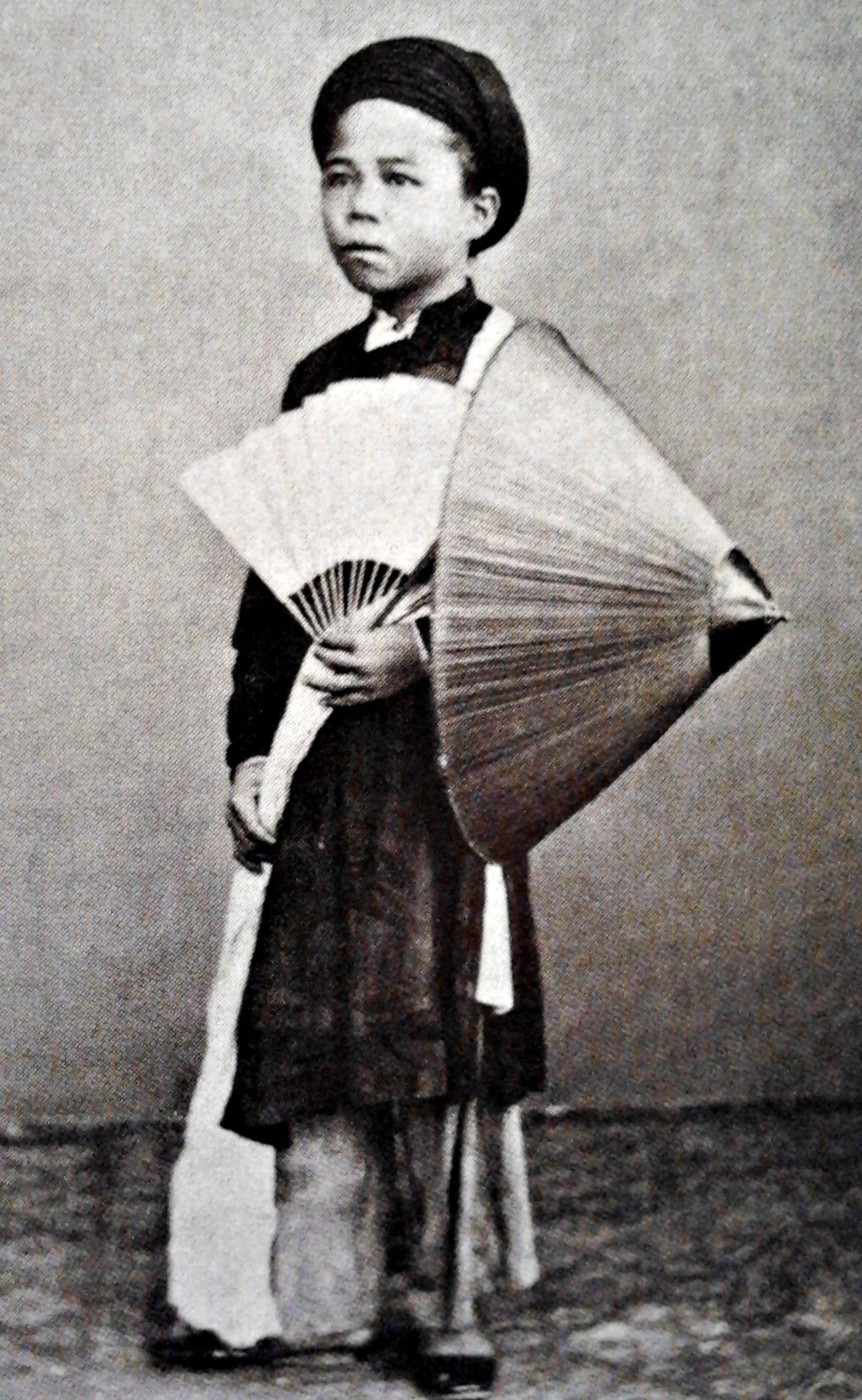 Jeune annamite. Photo d'Emile Gsell dans son studio de Saigon (années 1870)